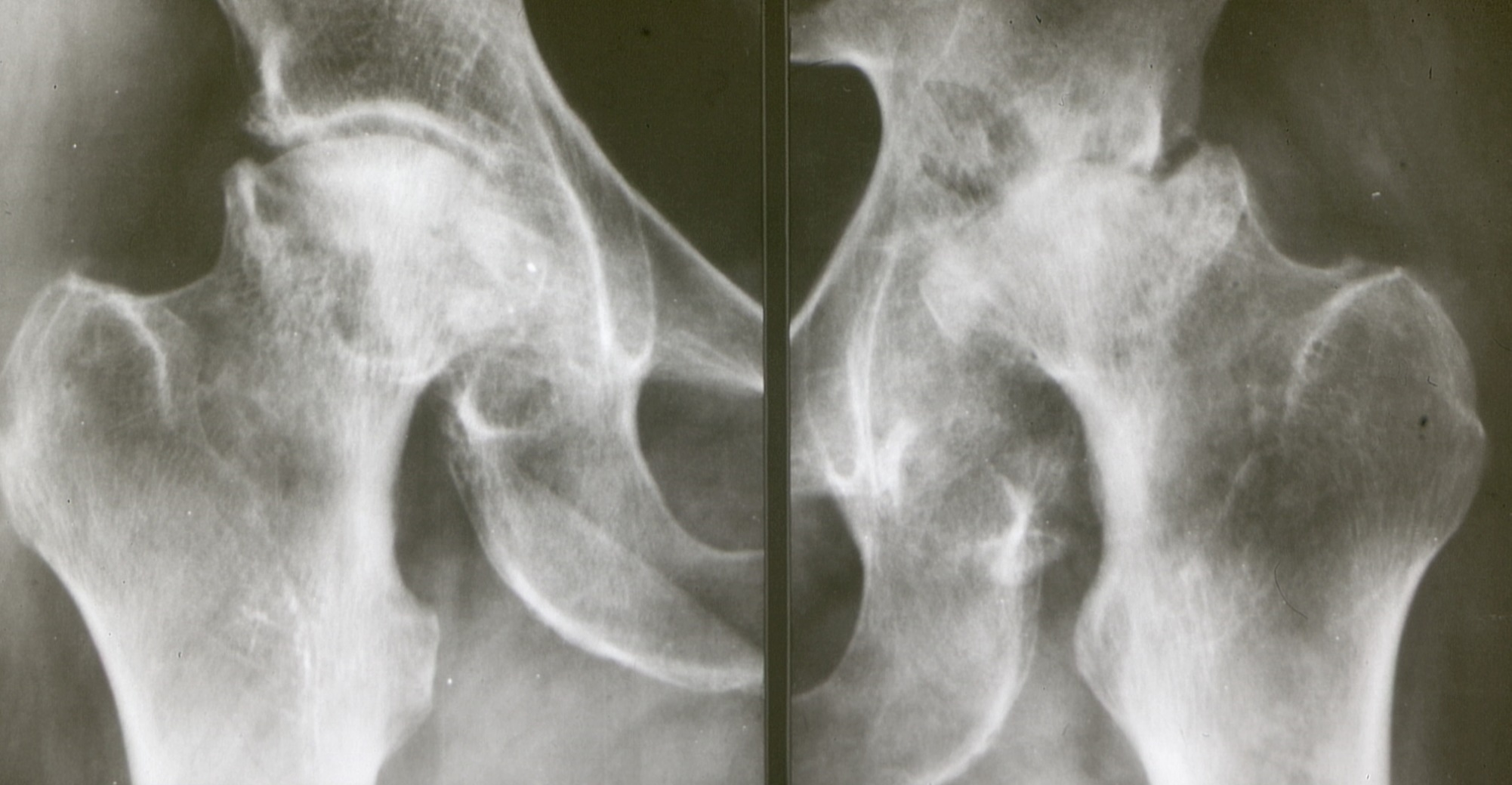 Röntgenbilder der Hüftgelenke eines 46-jährigen Mannes: Eingesunkene Femurkopfnekrose beiderseits nach systemischer Kortisonmedikation wegen Nierentransplantation.